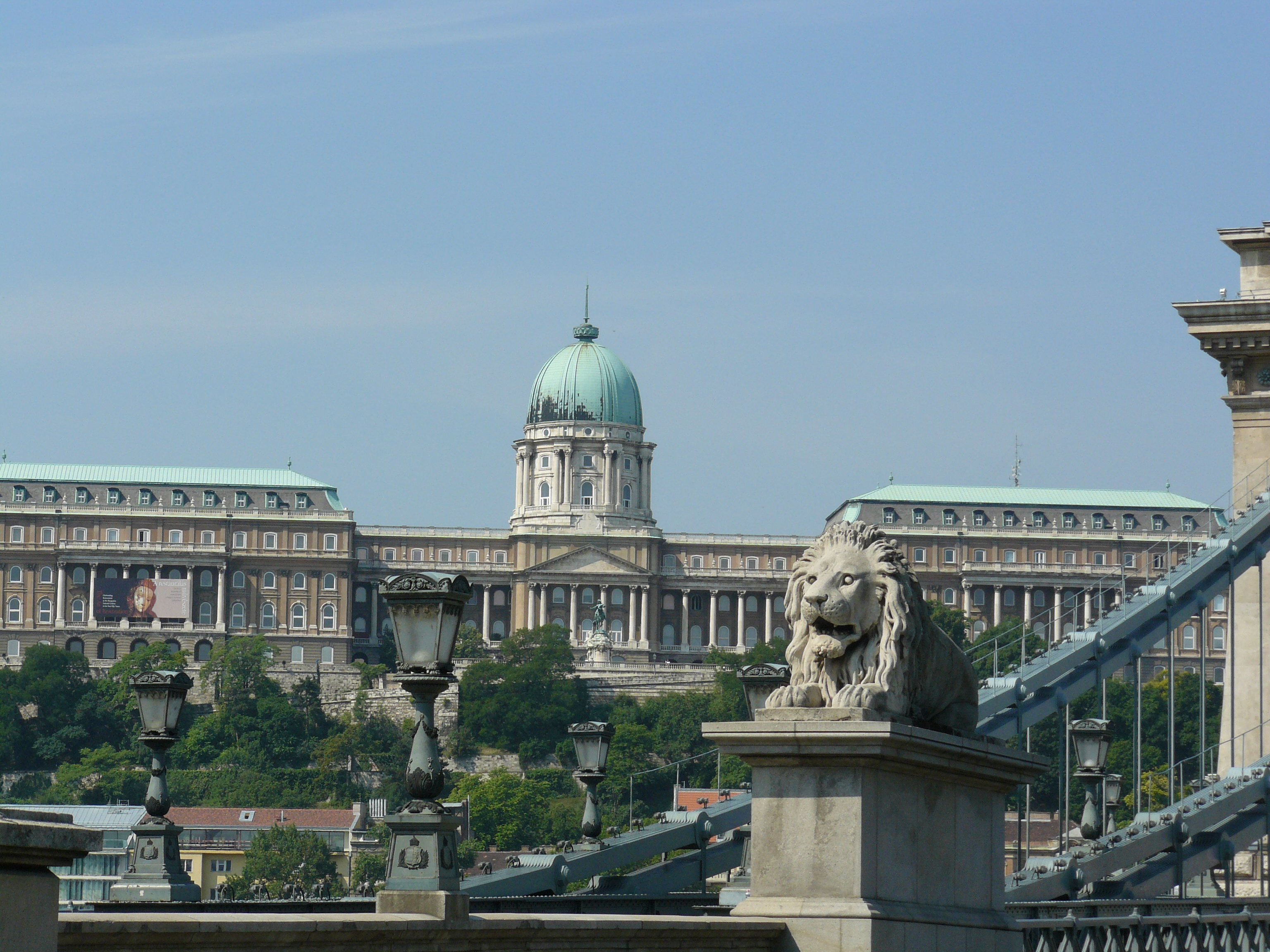 Budai vár